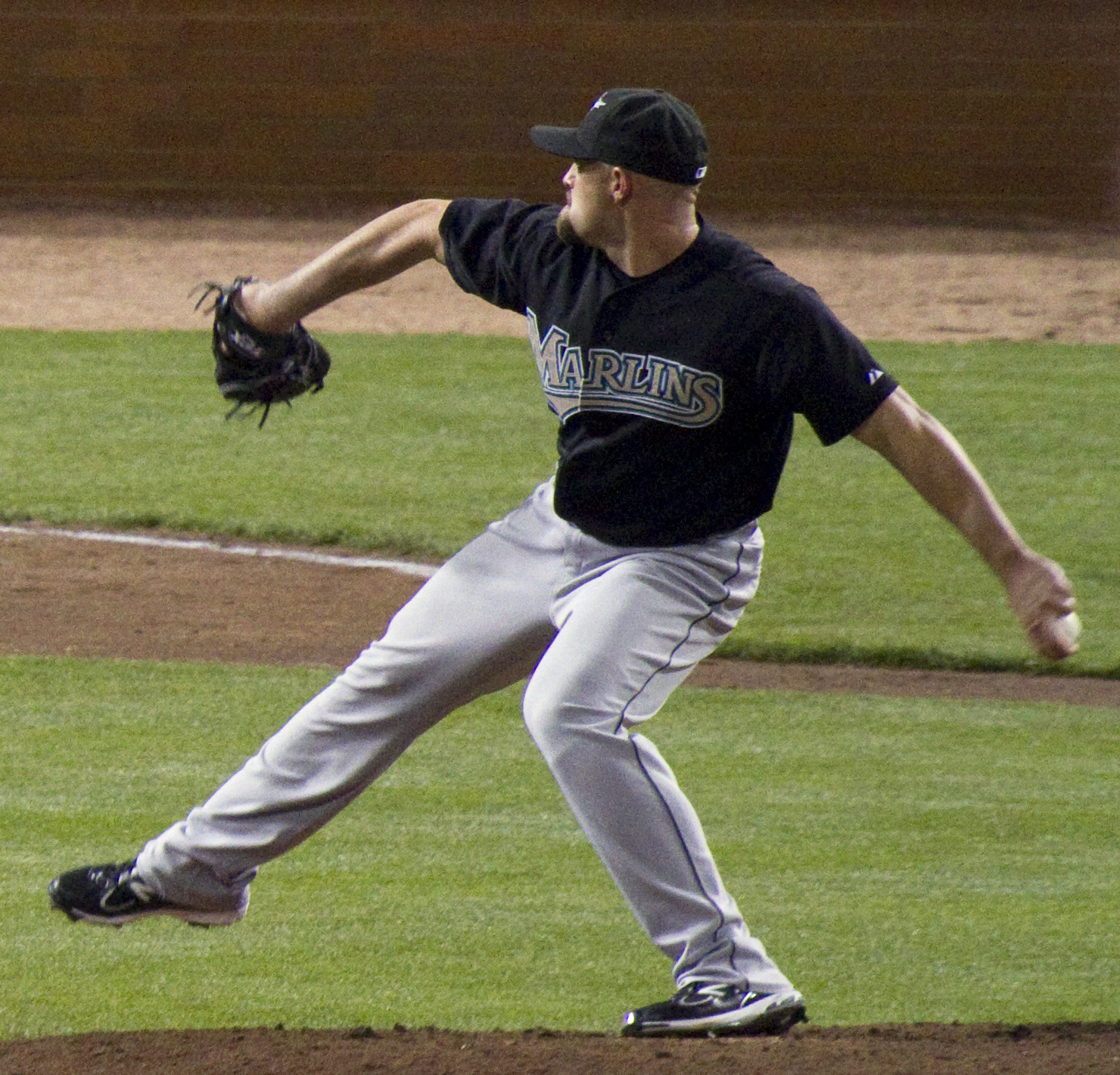 Michael Dunn